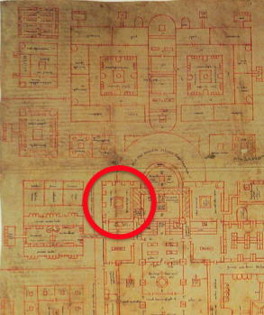 Recorte da planta baixa da Abadia de São Galo, na suíça, com intenção de mostrar onde está localizado seu scriptorium